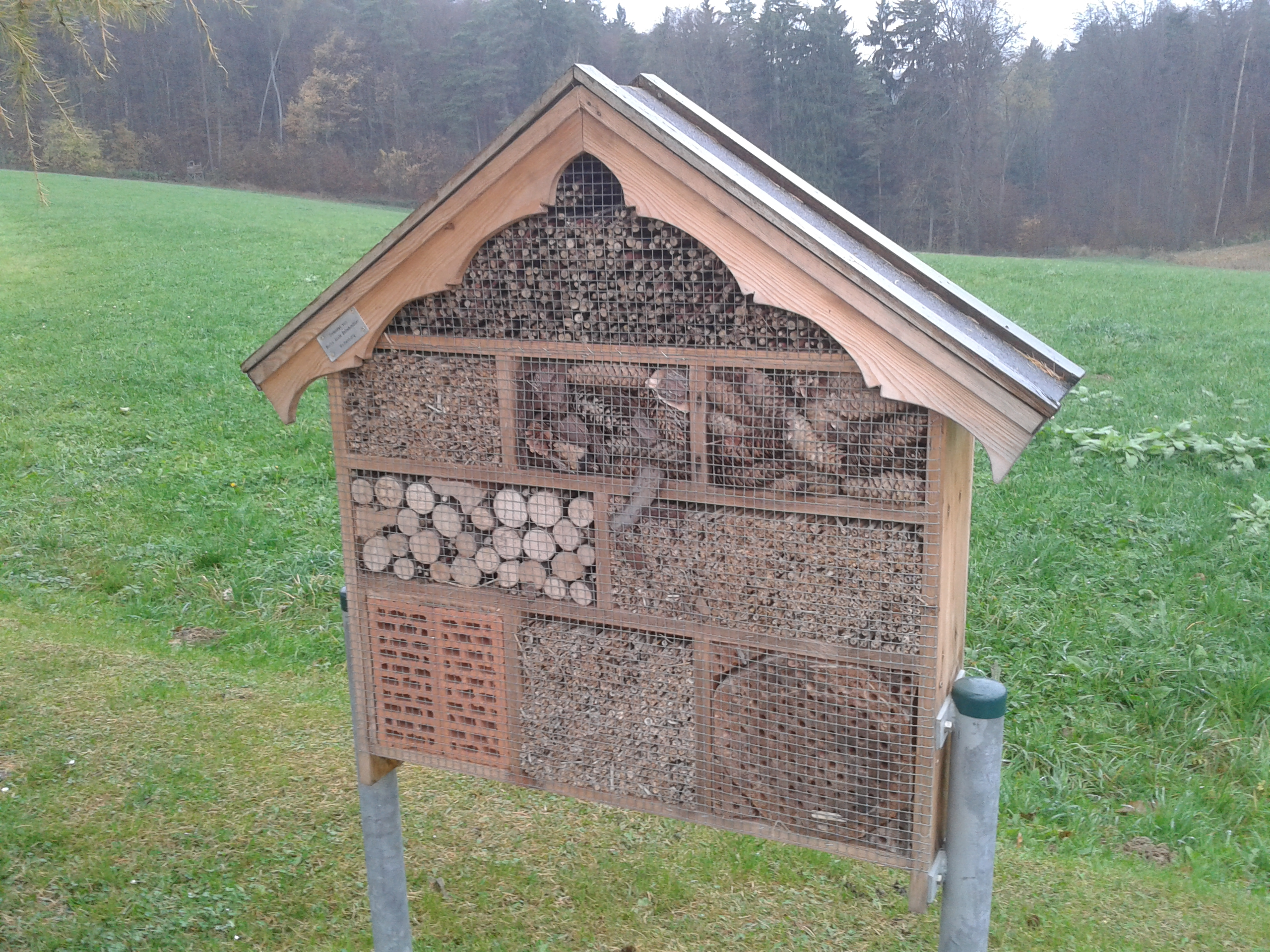 Ein Insektenhotel in der Nähe von Kelheim auf dem Wanderweg Richtung Weltenburg